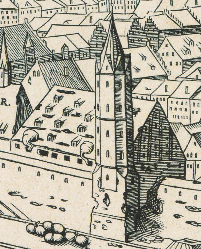 Das Kornhaus in Leipzig hinter dem Hohen Turm (1547). Ausschnitt aus dem Holzschnitt zur Belagerung Leipzigs im Schmalkaldischen Krieg